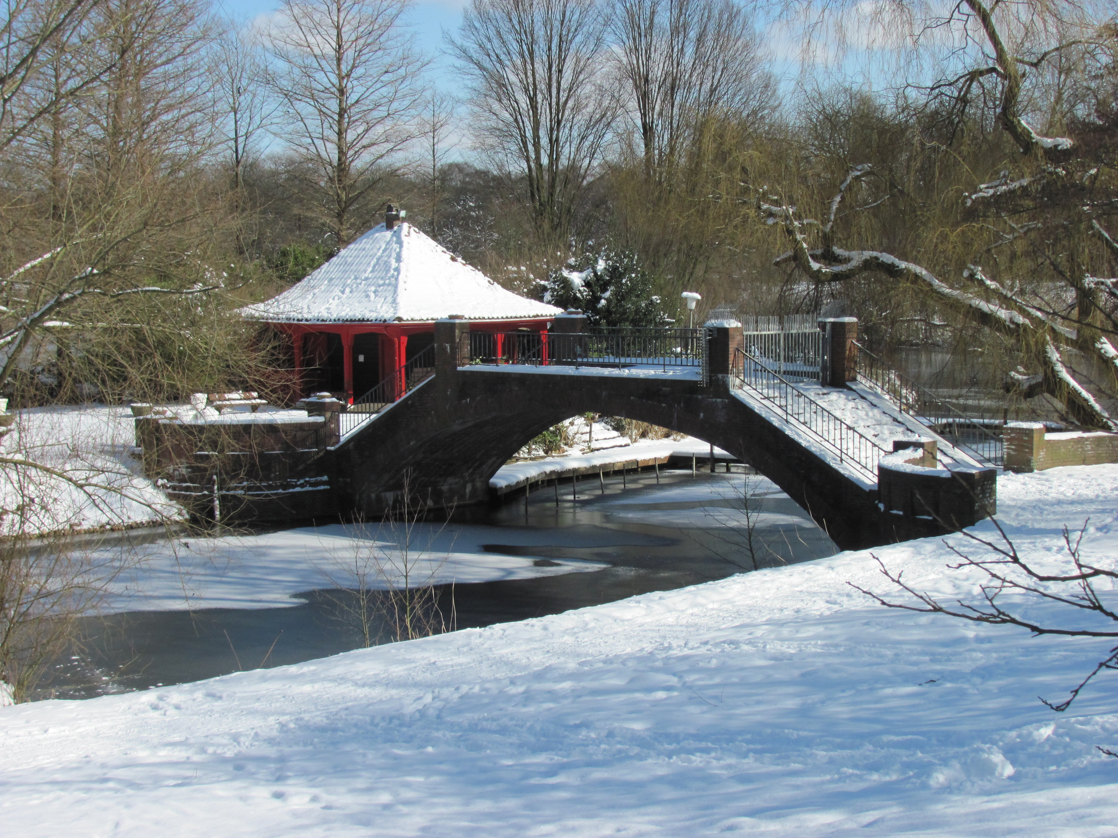 Von Fritz Schumacher entworfene Brücke zur Liebesinsel im Stadtparksee